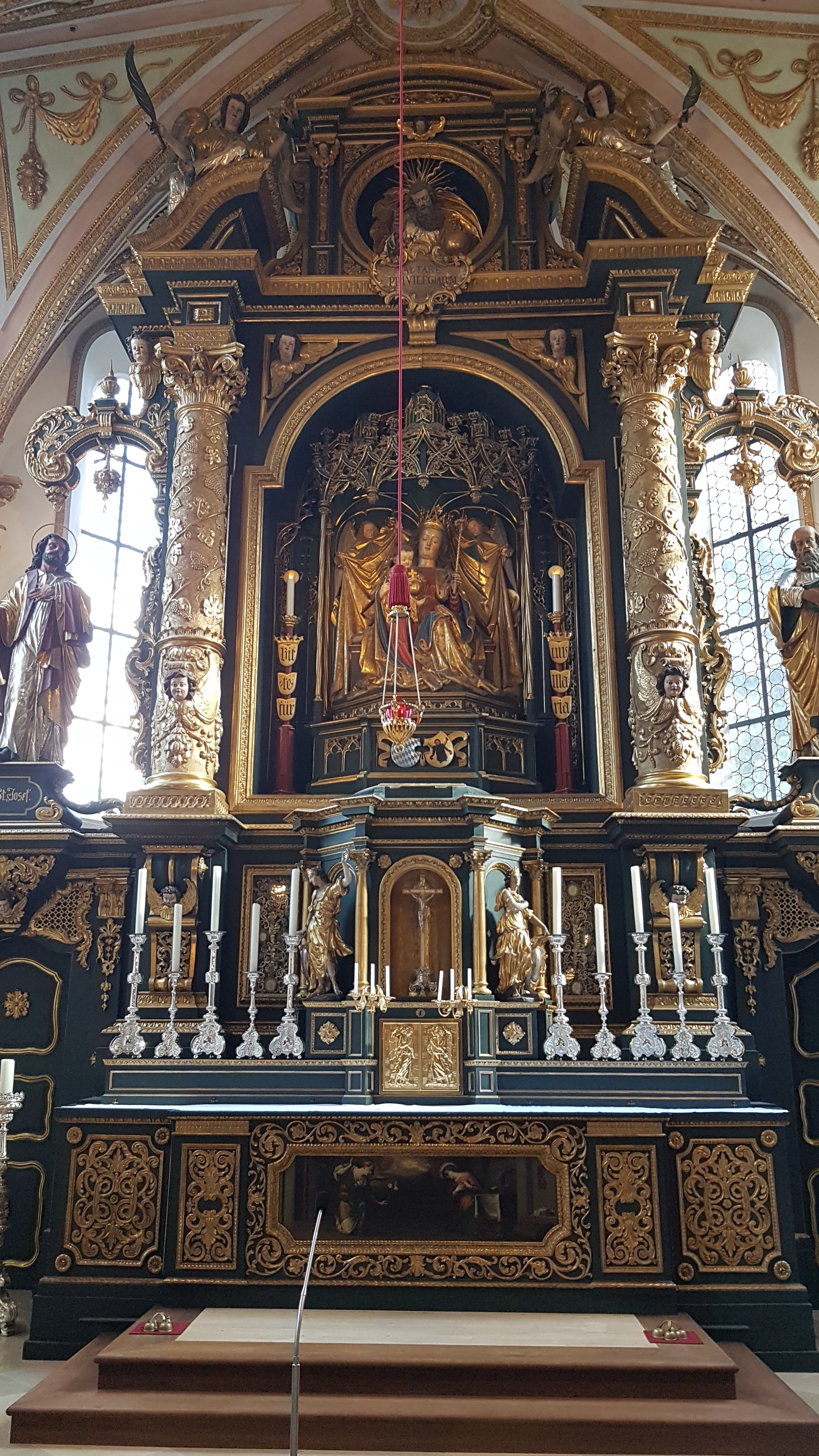 St. Maria (Ramersdorf)